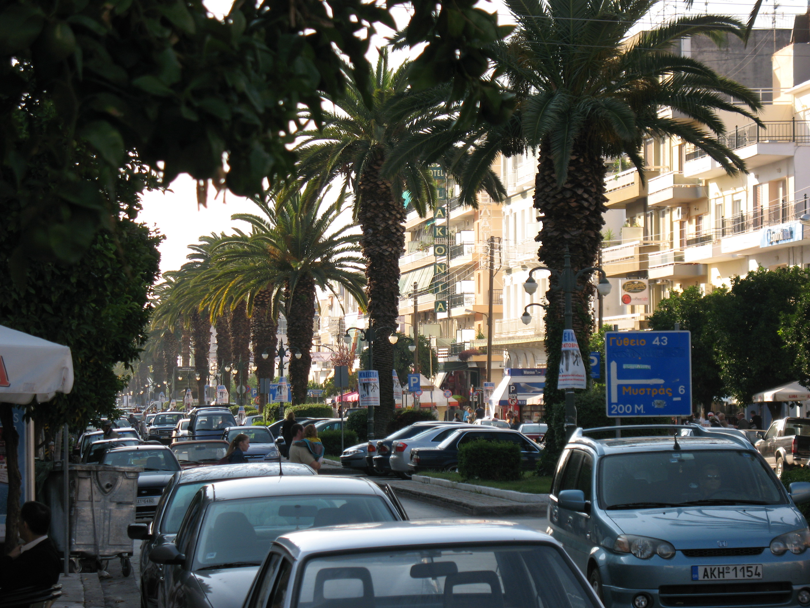 Sparta